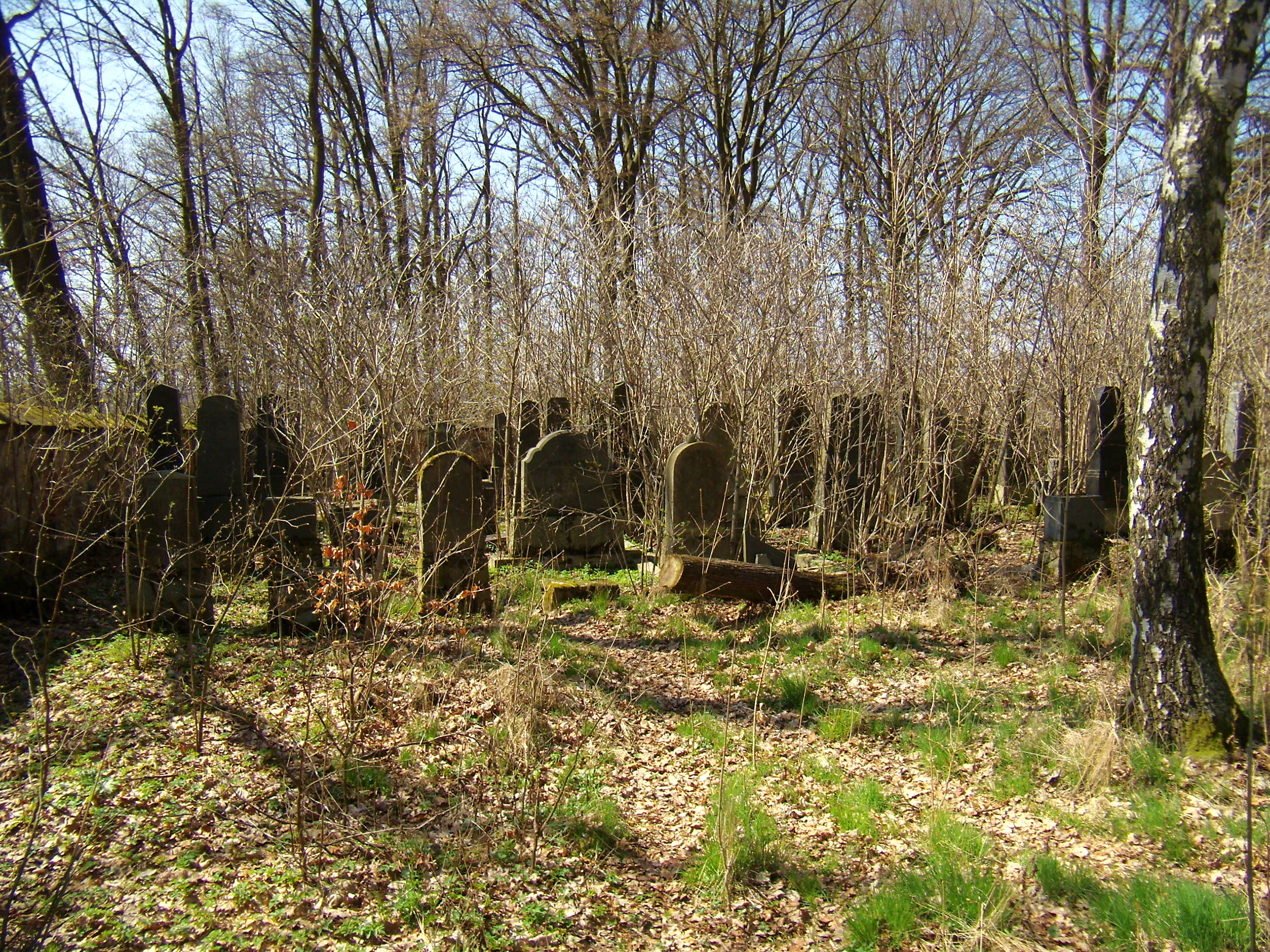 Chodová Planá - nový ŽH